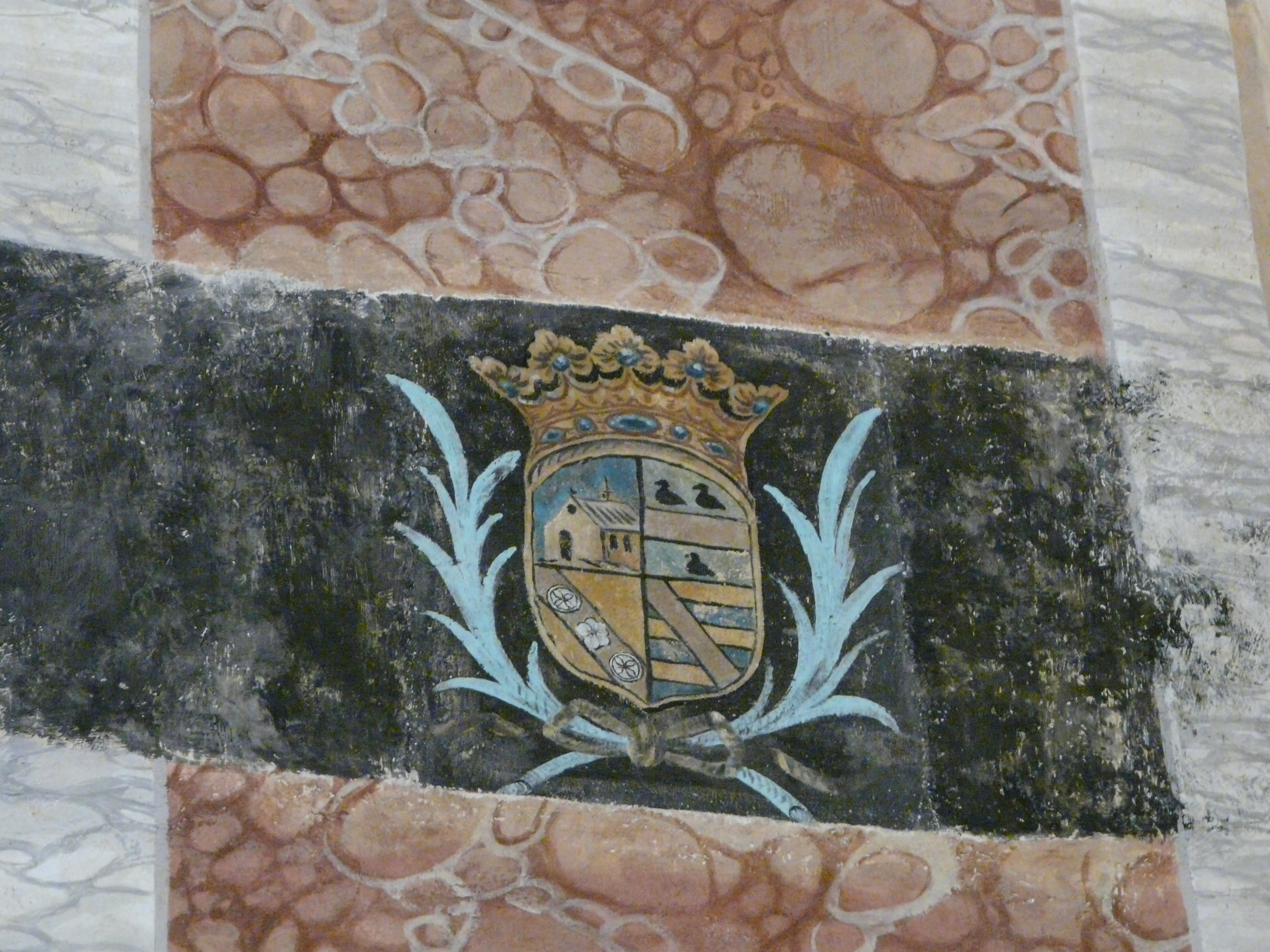 Représentation des armoiries de Jean de Jumilhac (mort en 1693). Litre funéraire de l'église Saint-Pierre-ès-Liens, Jumilhac-le-Grand, Dordogne, France.